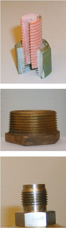 drie foto's van schroefdraden